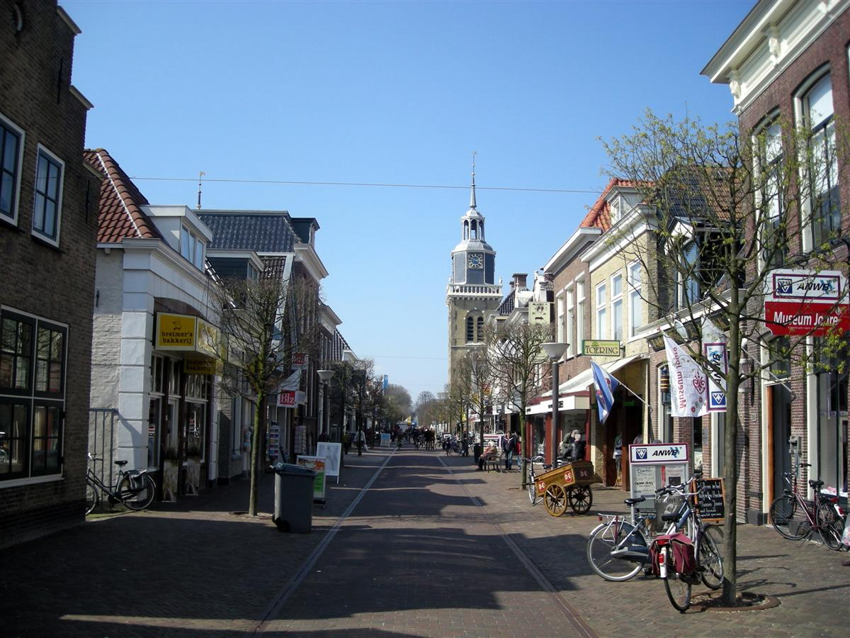 De Midstraat in Joure (winkelstraat).